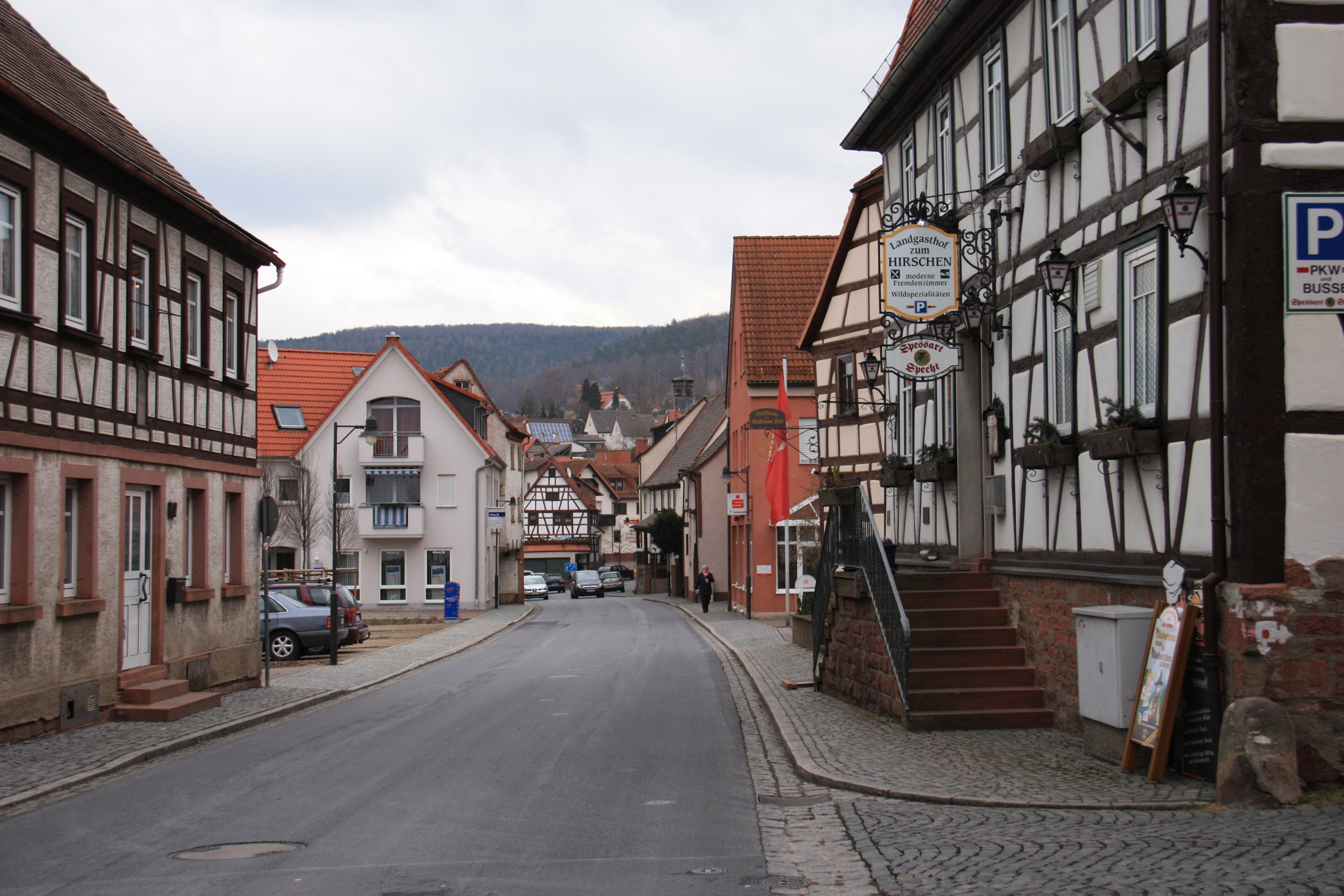 Die Mönchberger Hauptstraße